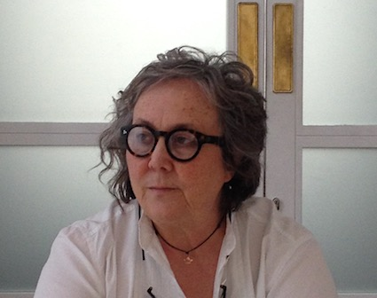 filosofa italiana